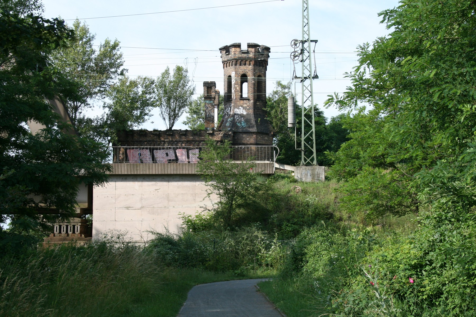 Magdeburg Eisenbahnbrücke Herrenkrug, Reste des westlichen Brückenkopfes